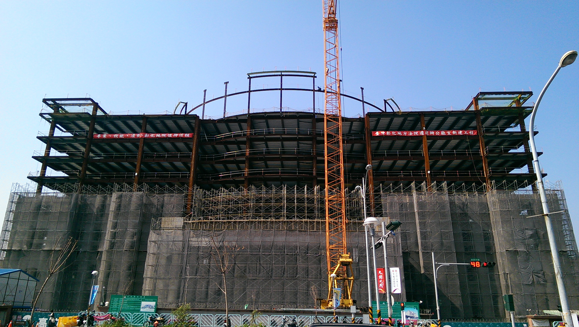 臺灣彰化地方法院大廈新建工程 2014.4